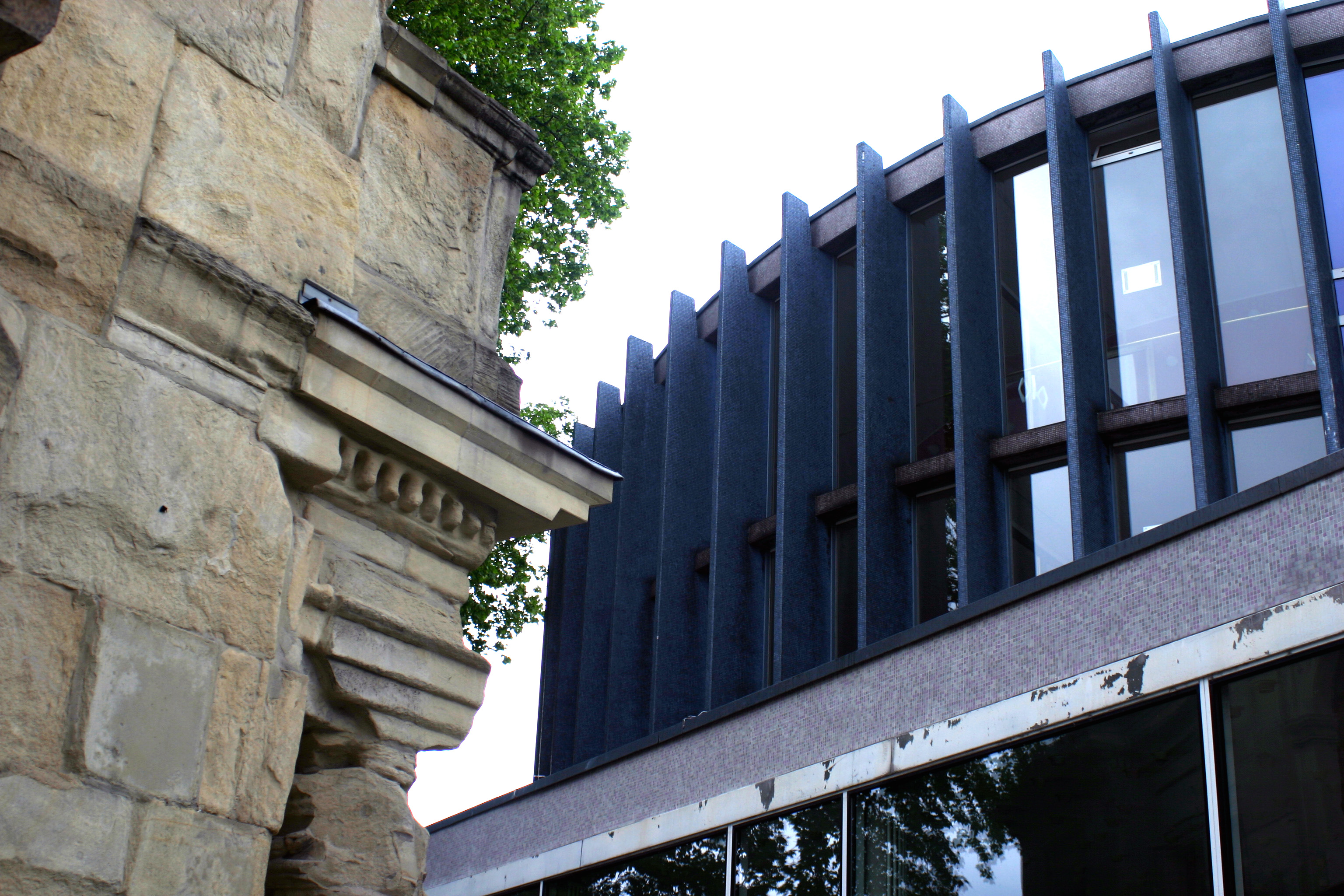 Städtische Bühnen Münster - Stadttheater